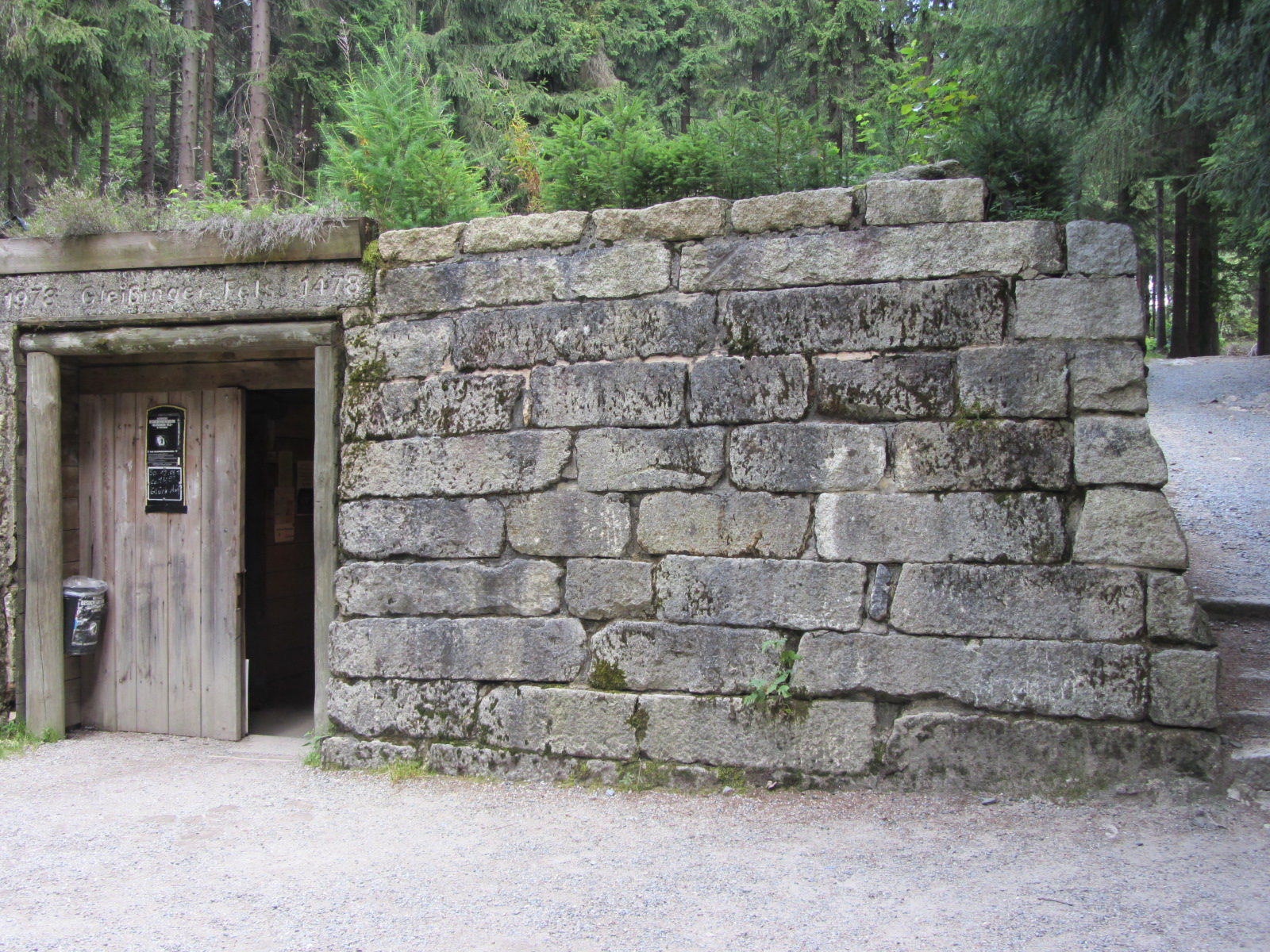 Eingang ins Besucherbergwerk Gleißinger Fels